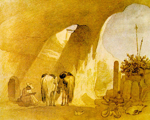 Могила святого Далісмена (Далісмен-Мула-Аульє) Зліва знизу олівцем рукою Шевченка порядковий номер і напис, зроблені під час експедиції: 22. Далисменъ-Мула аулье. Далісмен-Мула-Аульє (що означає «могила святого Далісмена») знаходиться в центральній частині Північного Ак-Тау. Про подібні могили Шевченко згадує в щоденнику: «Туркменці и киргизи святим своїм (аульє) не ставлять, подобно до батырів, пишних абу (склепів), на труп святого навалять потворну купу каміння, накидають верблюжих, конячих і баранячих костей. Рештки жертвоприношень. Ставлять високу дерев’яну тичку, часом увінчану спиисом, обвивають цю тичку кольоровим ганчір’ям, і на тому звершується замогильне пошанування святго». Бр. Залеський в пояснювальному тексті до офорта з цього малюнка дає такий же опис могили, як і Шевченко, зазначаючи, що могила знаходиться поблизу гори Чиркала-Тау (див. альбом «La vie des steppes Kirghizes», Paris, 1865, стор. 59).